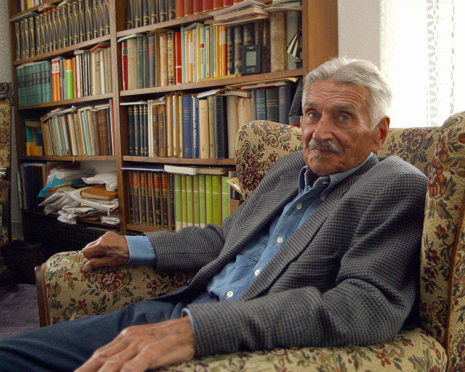 Fotografie des Chirurgen Otto Scholz